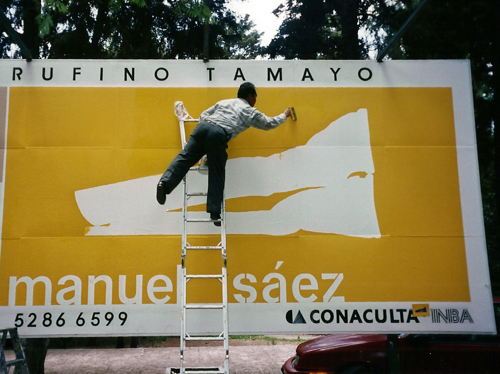 Realización del cartel de Manuel Sáez para el Museo Rufino Tamayo, México, 2001